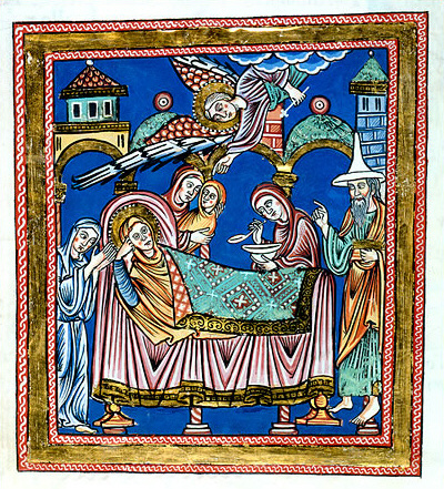 Geburt Mariens, Evangelistar aus St. Peter auf dem Schwarzwald, um 1200; Badische Landesbibliothek Karlsruhe, Cod. St. Peter perg. 7, fol. 10v; Beschreibung